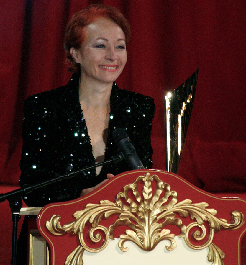 Sona MacDonald ausgezeichnet für die Beste Nebenrolle während der Verleihung des Nestroy-Theaterpreises 2009 (Circus Roncalli auf dem Wiener Rathausplatz).